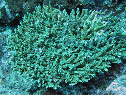 Acropora divaricata, en el Parque Nacional de Samoa Americana